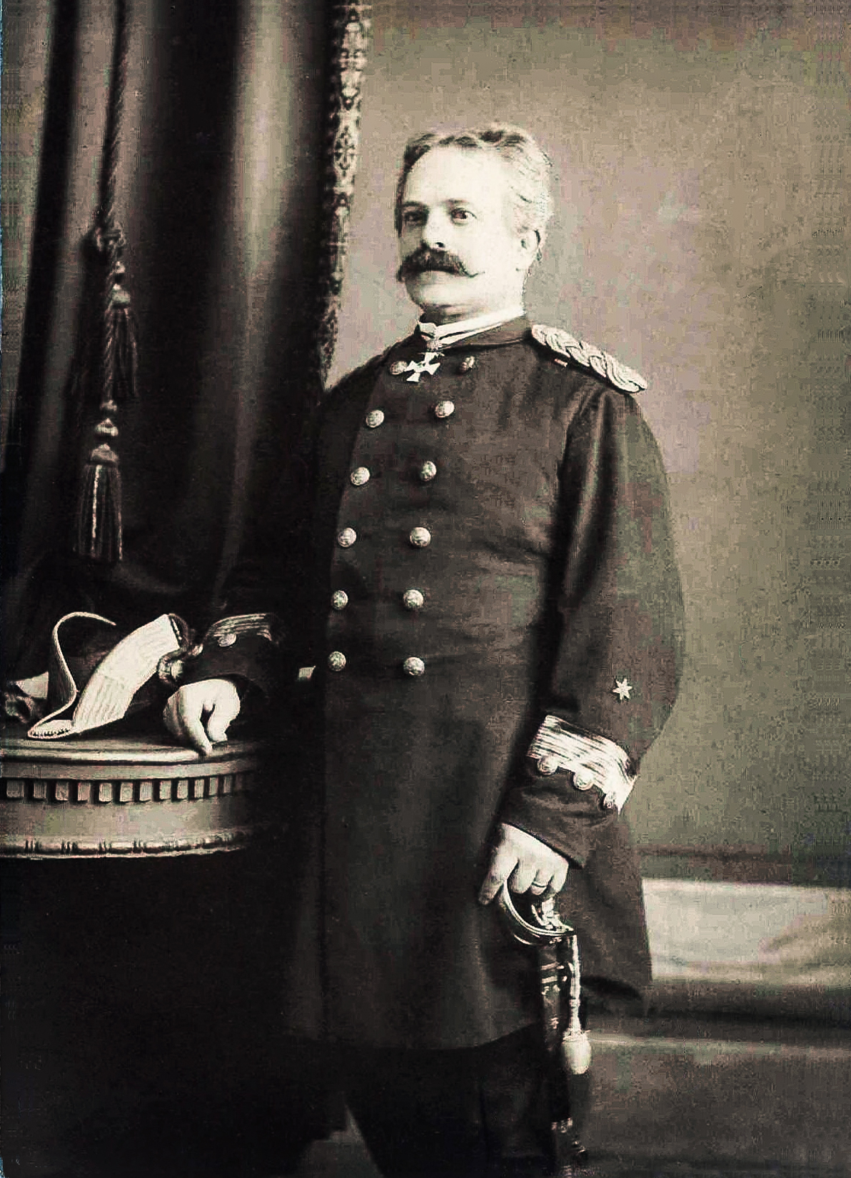 Porträt des Konteradmirals Adolph Wilhelm Berger